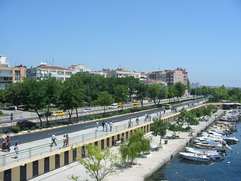 Bakirkoy sea side 2